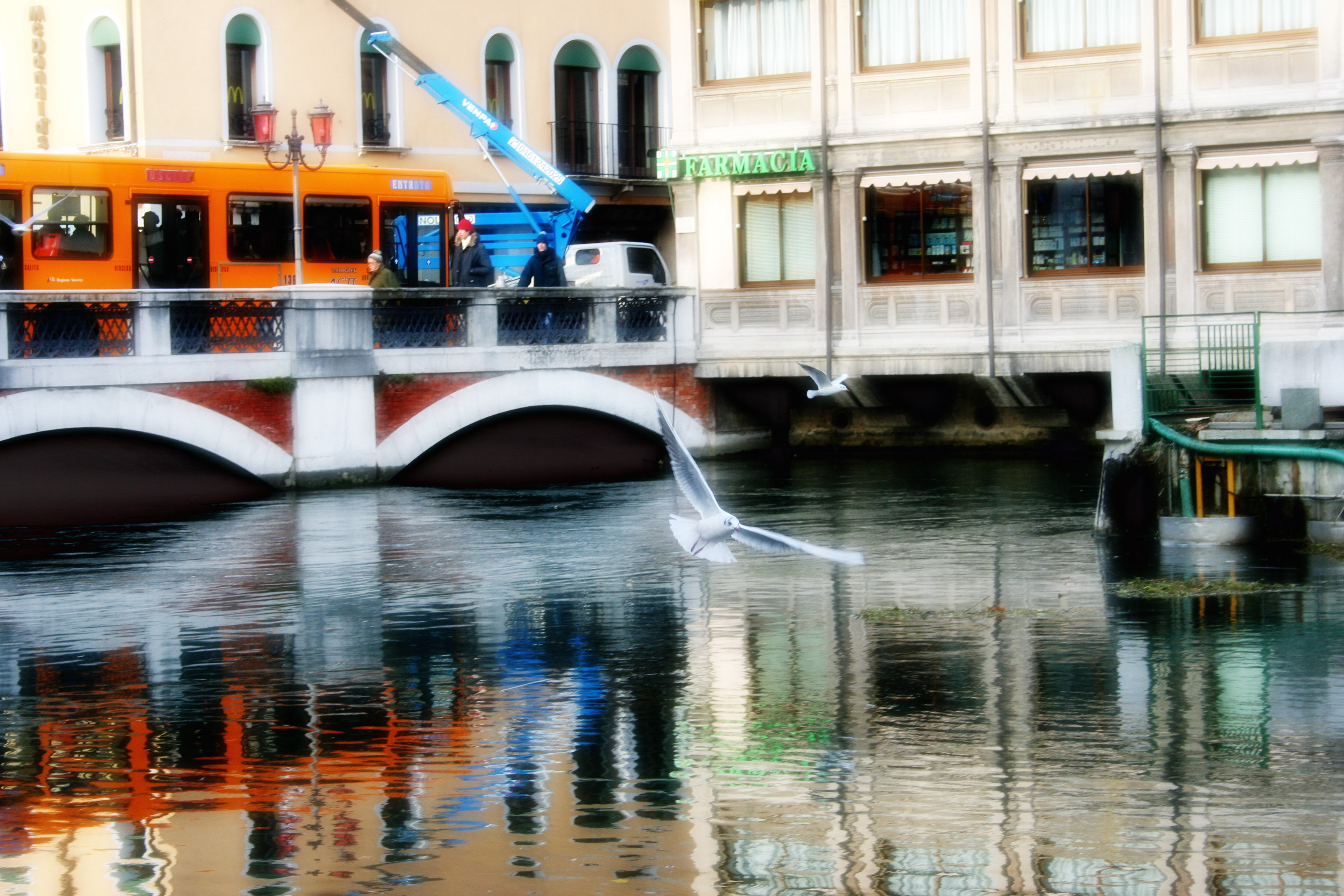 Ponte S.Martino e vicino alla centrale elettrica (S.martino bridge near water power dam, Treviso, ItaliaTreviso004